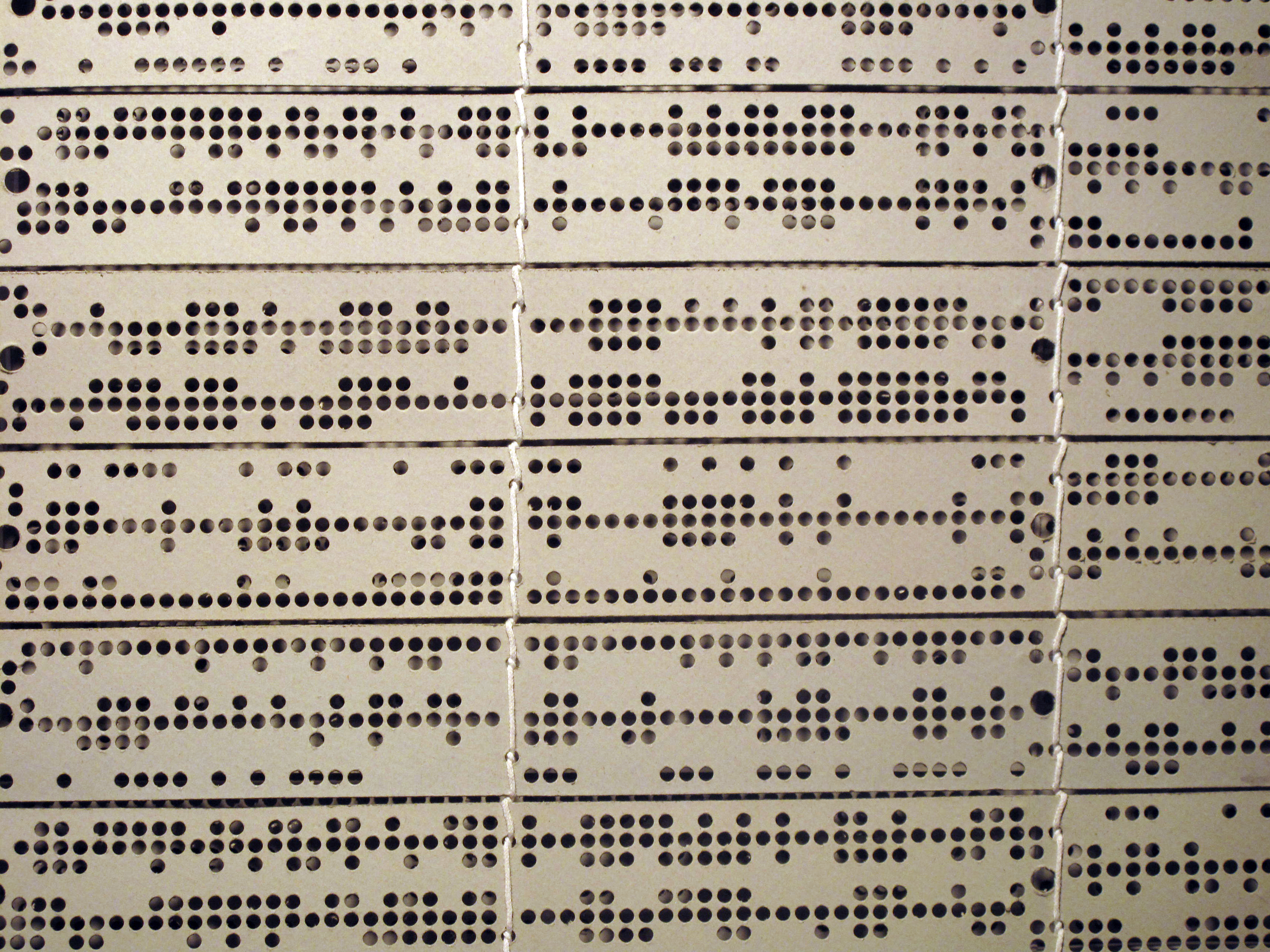 Centre de Documentació i Museu Tèxtil (Terrassa)